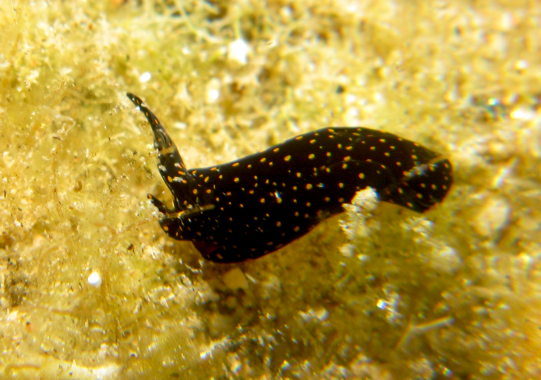 Chelidonura fulvipunctata, 3 mm, Egipto.